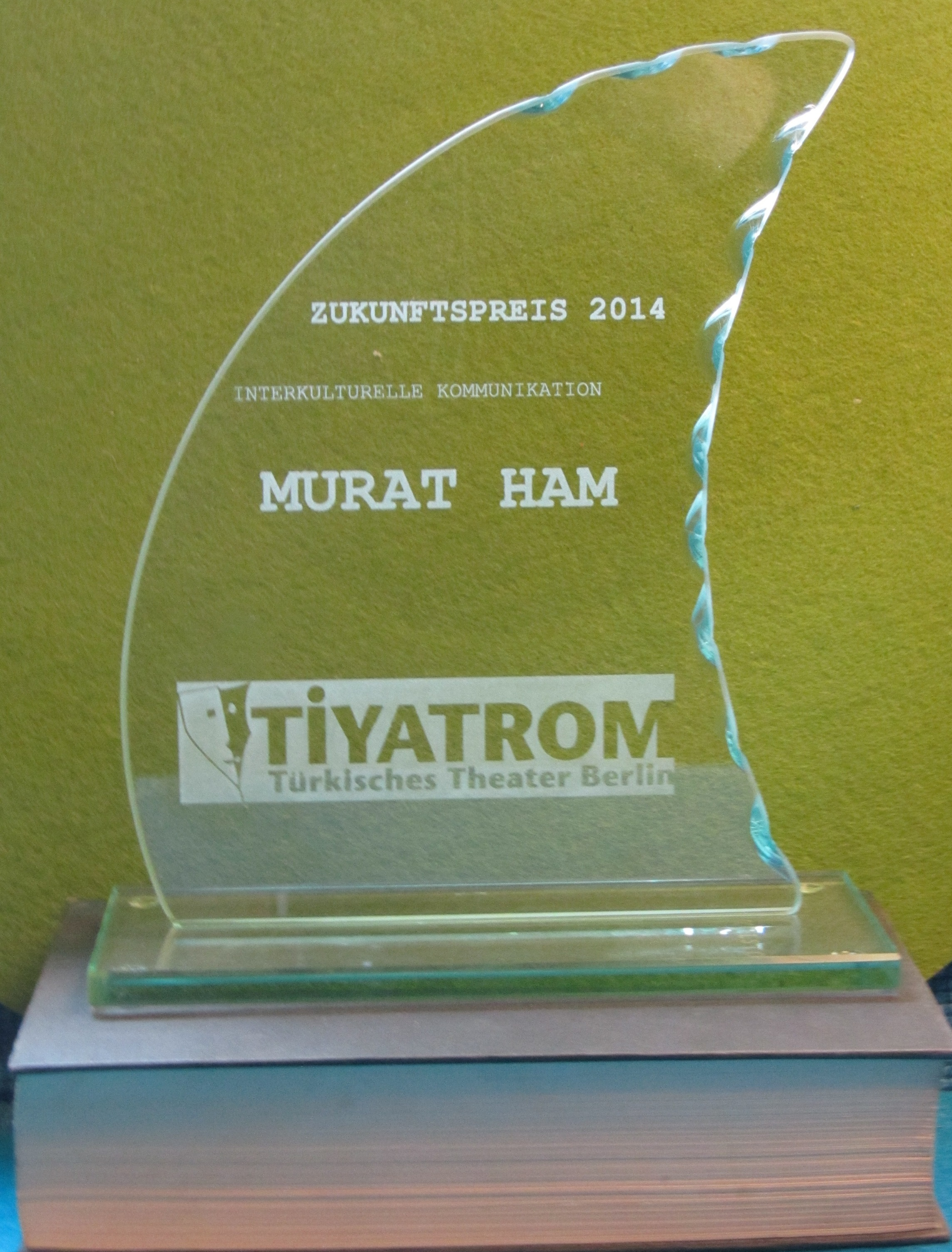 Pokal des Zukunftspreises 2014.